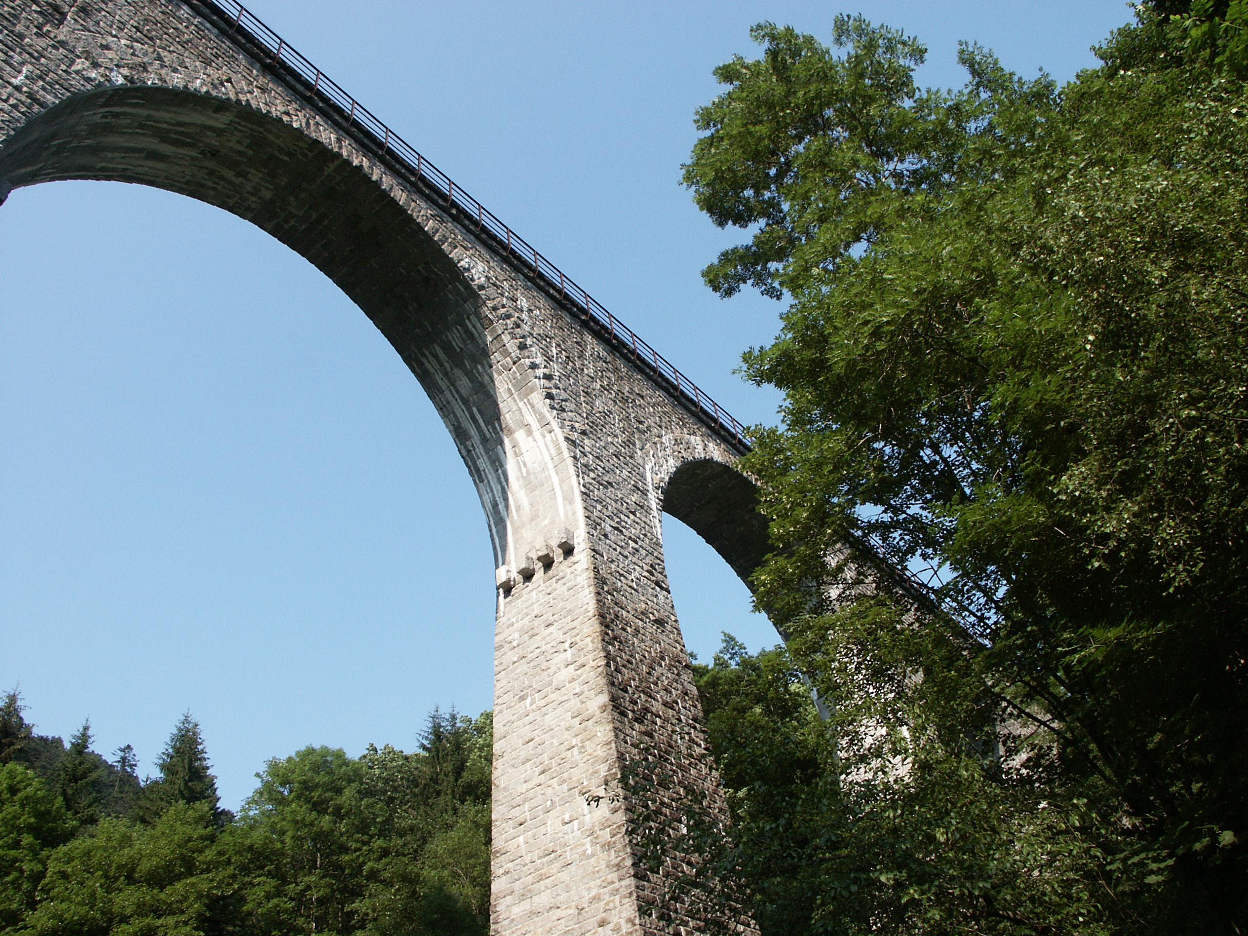 Alte Eisenbahnbrücke über das Höllental